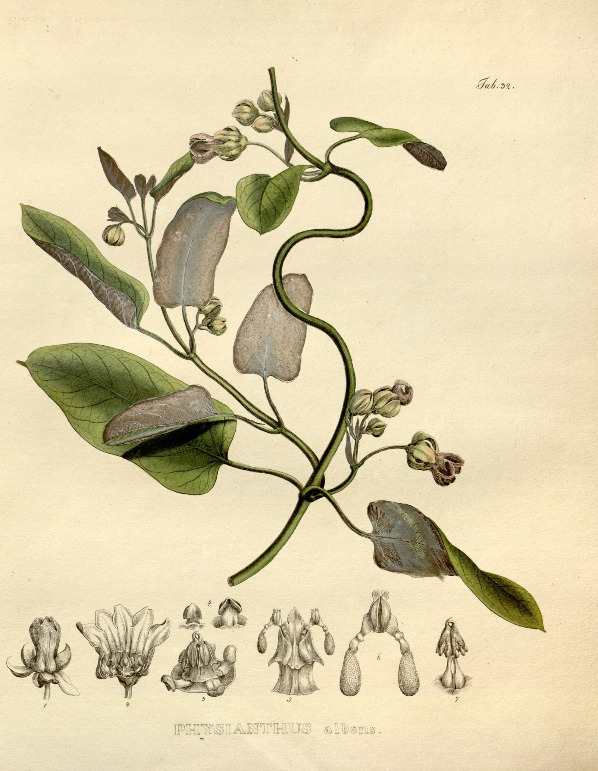 Physianthus albens = Araujia sericifera Nova genera et species plantarum. Monachii [Munich] :Impensis Auctoris,1824-1829 [i.e. 1824-32]..